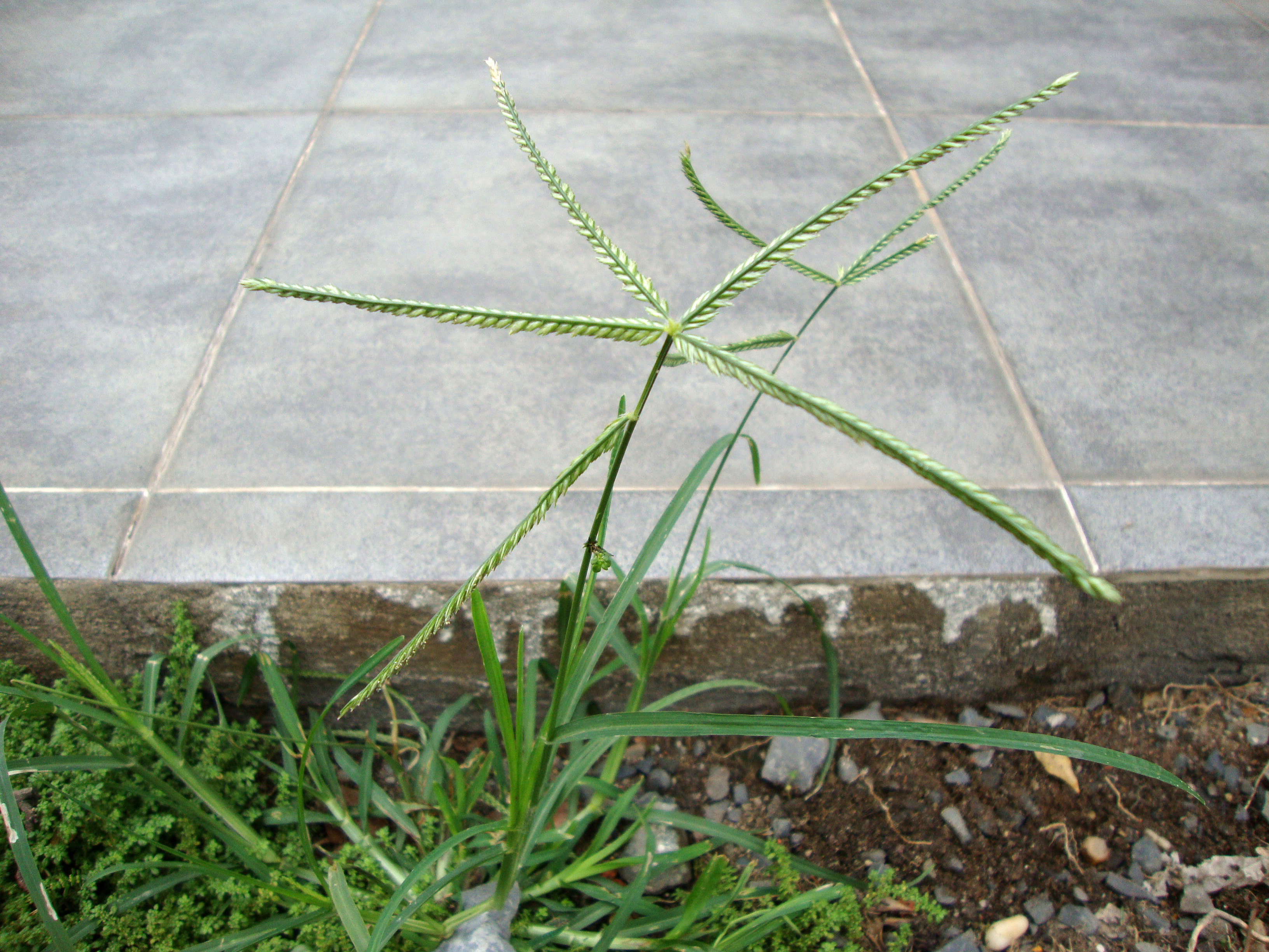 Eleusine indica (L.) Gaertn., 1788